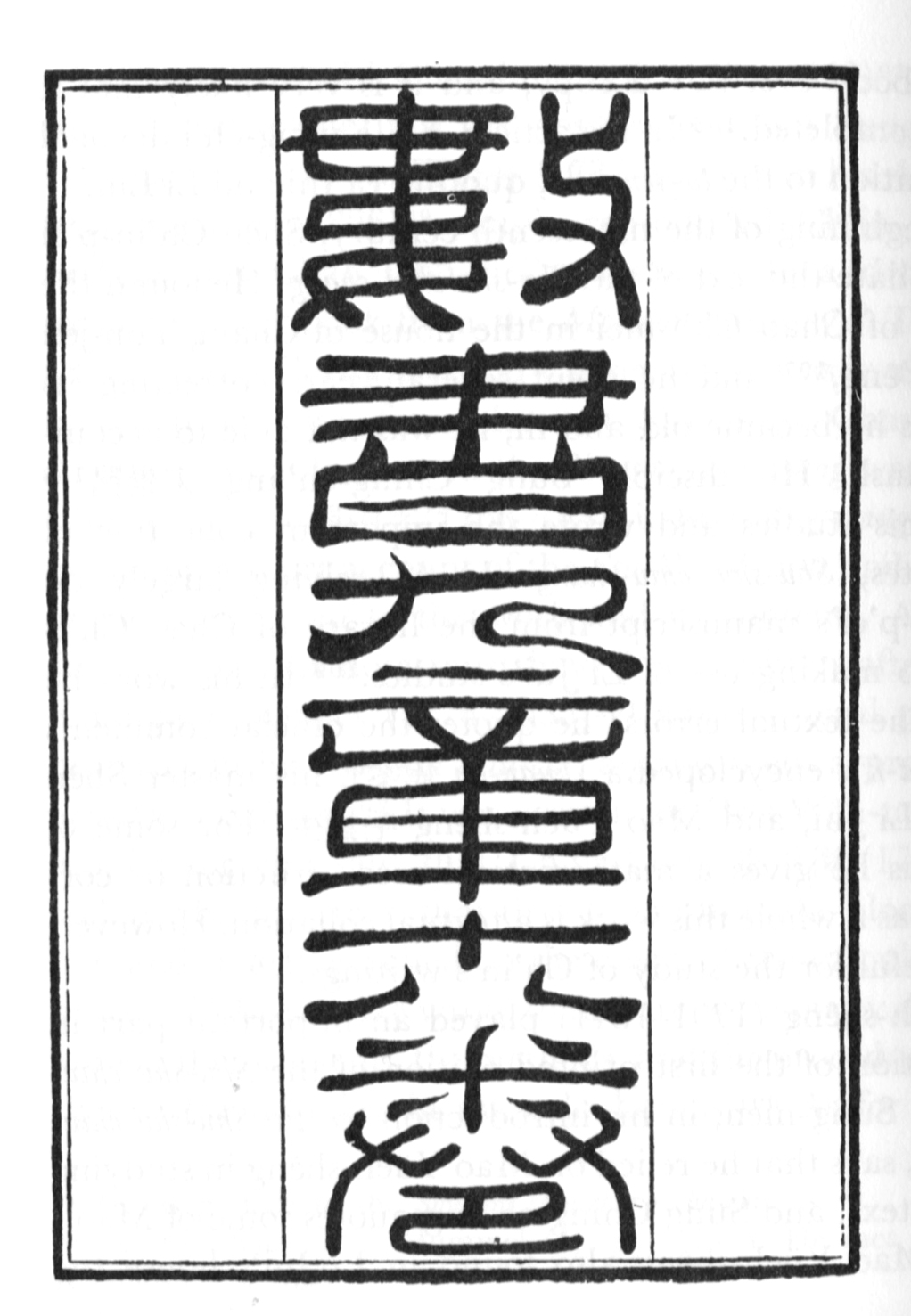 Shu Shu Jiu Zhang 18 volumes